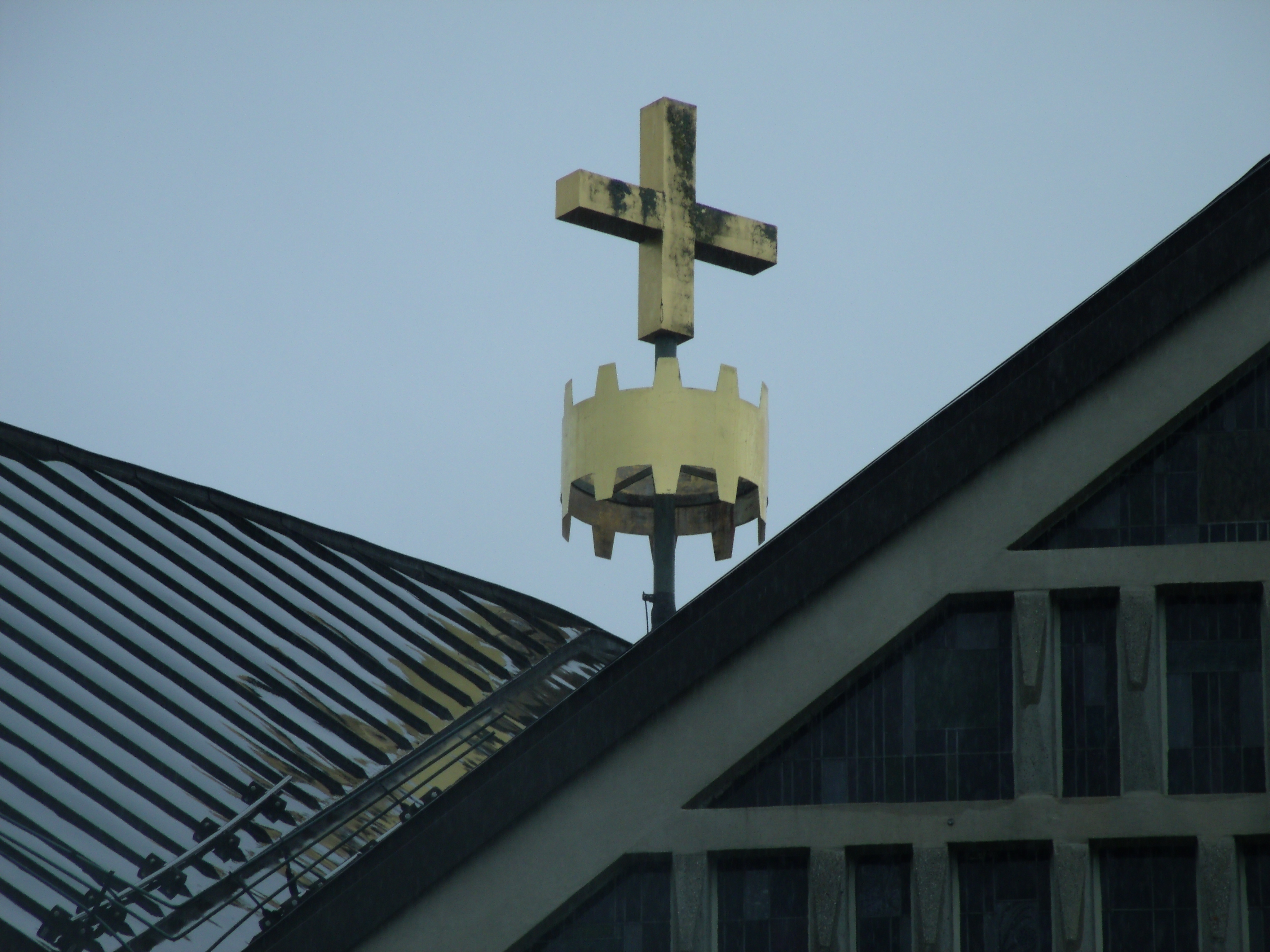 Christ-König-Kirche Ansbach, Dach mit Kreuz